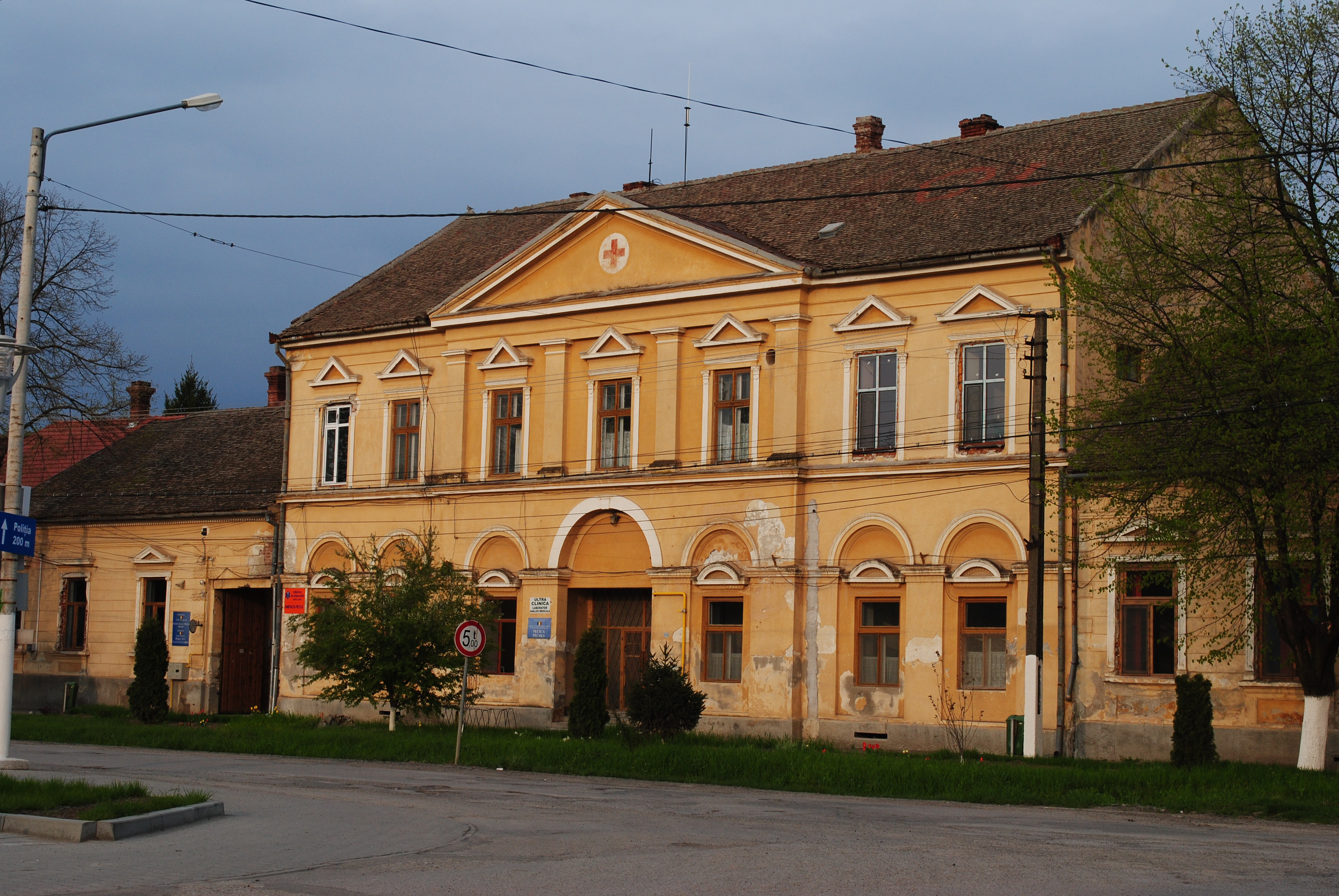 Ansamblul urban Pecica, 1850 - 1900